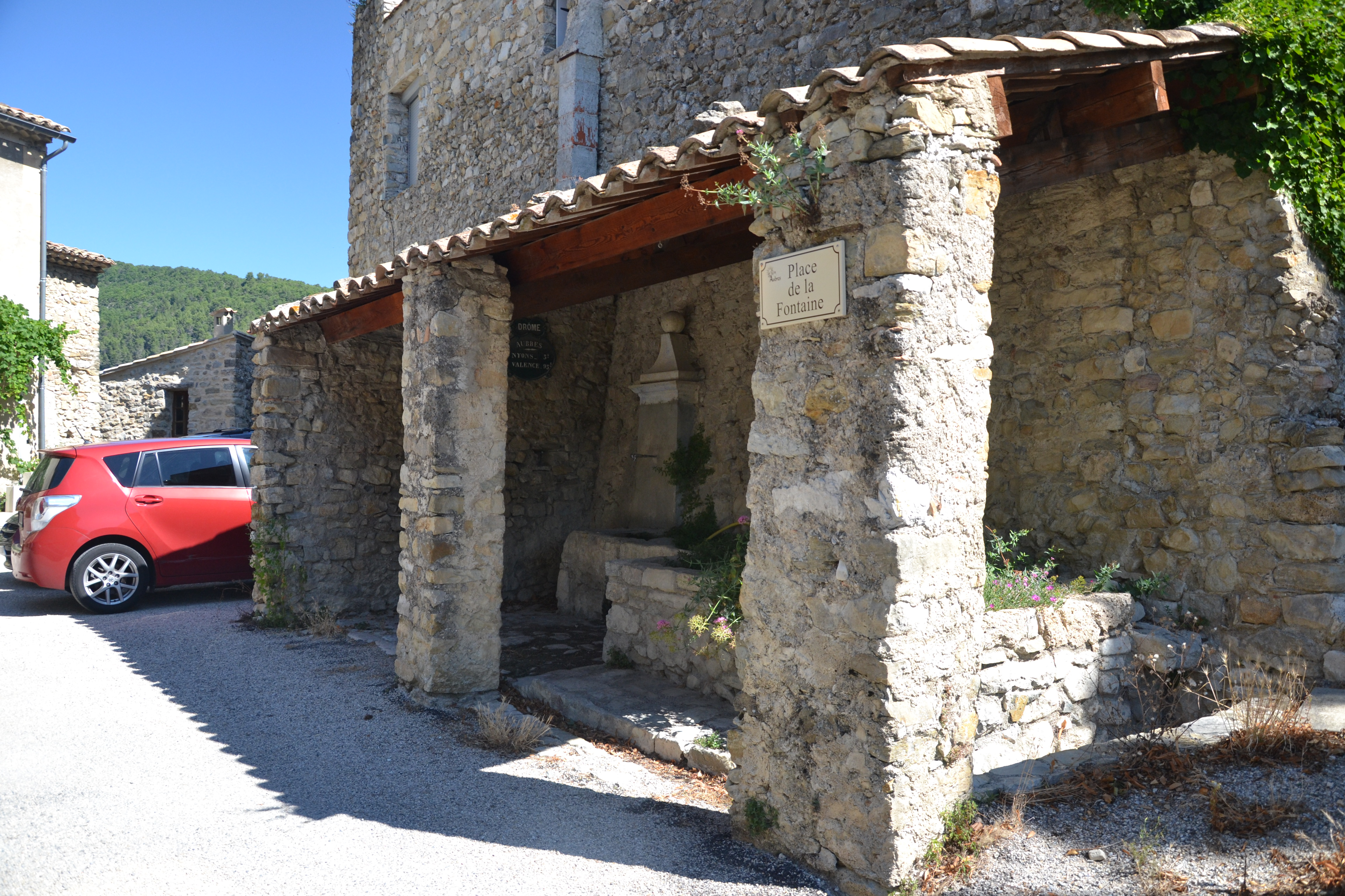 lavoir à Aubres